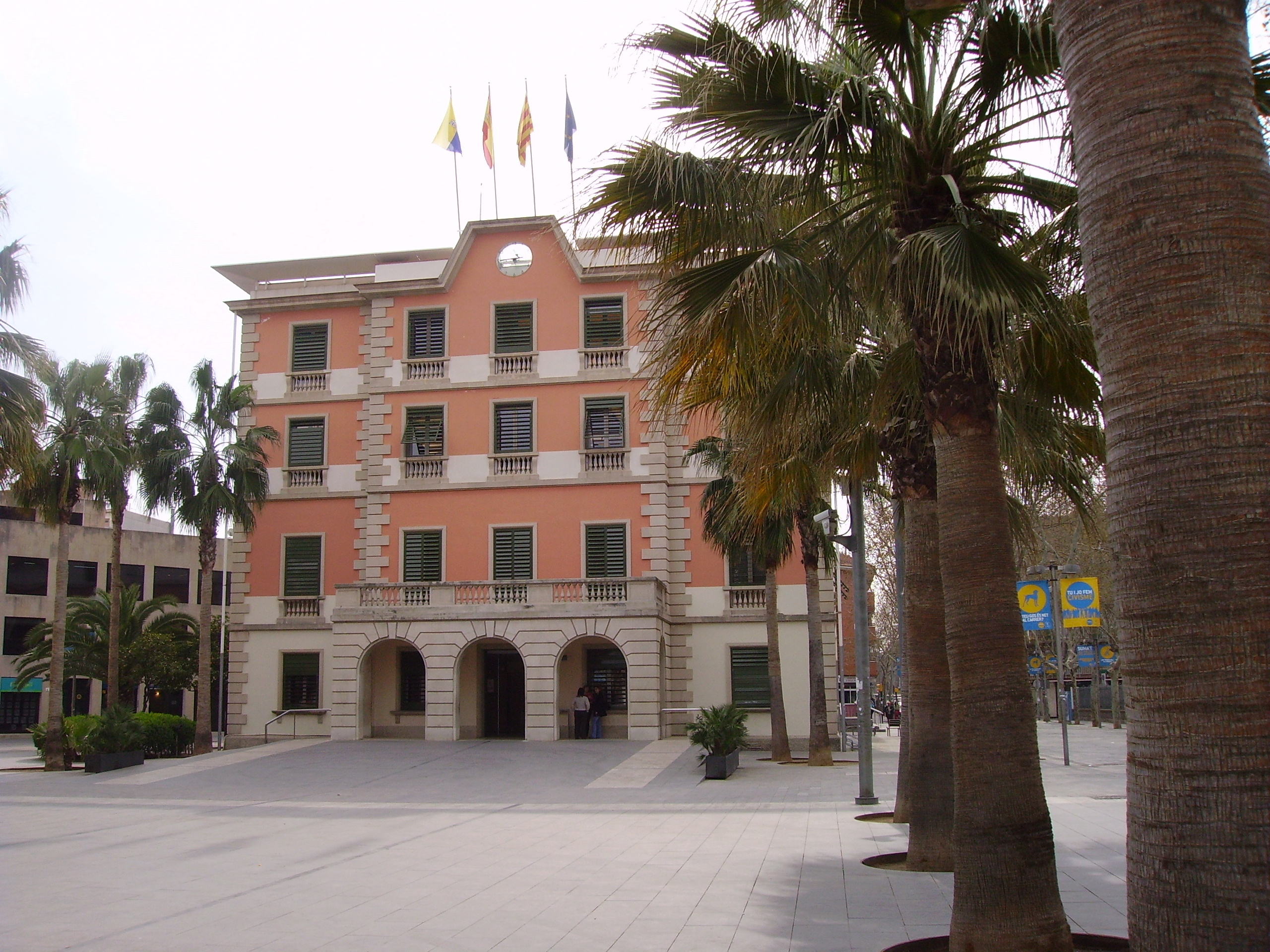 Ayuntamiento de Castelldefels, en Barcelona (España)